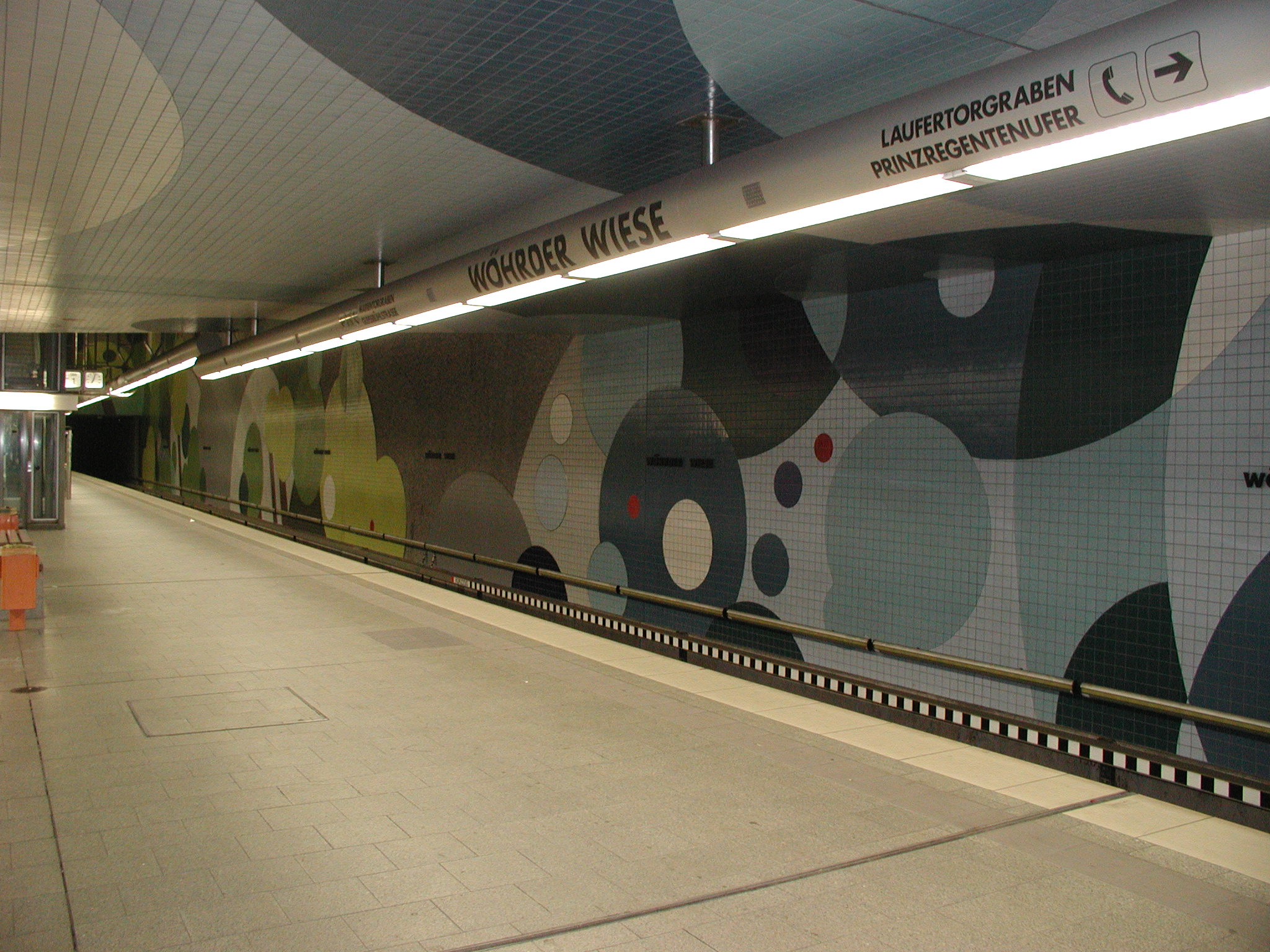 U-Bahnhof Nürnberg Wöhrder Wiese